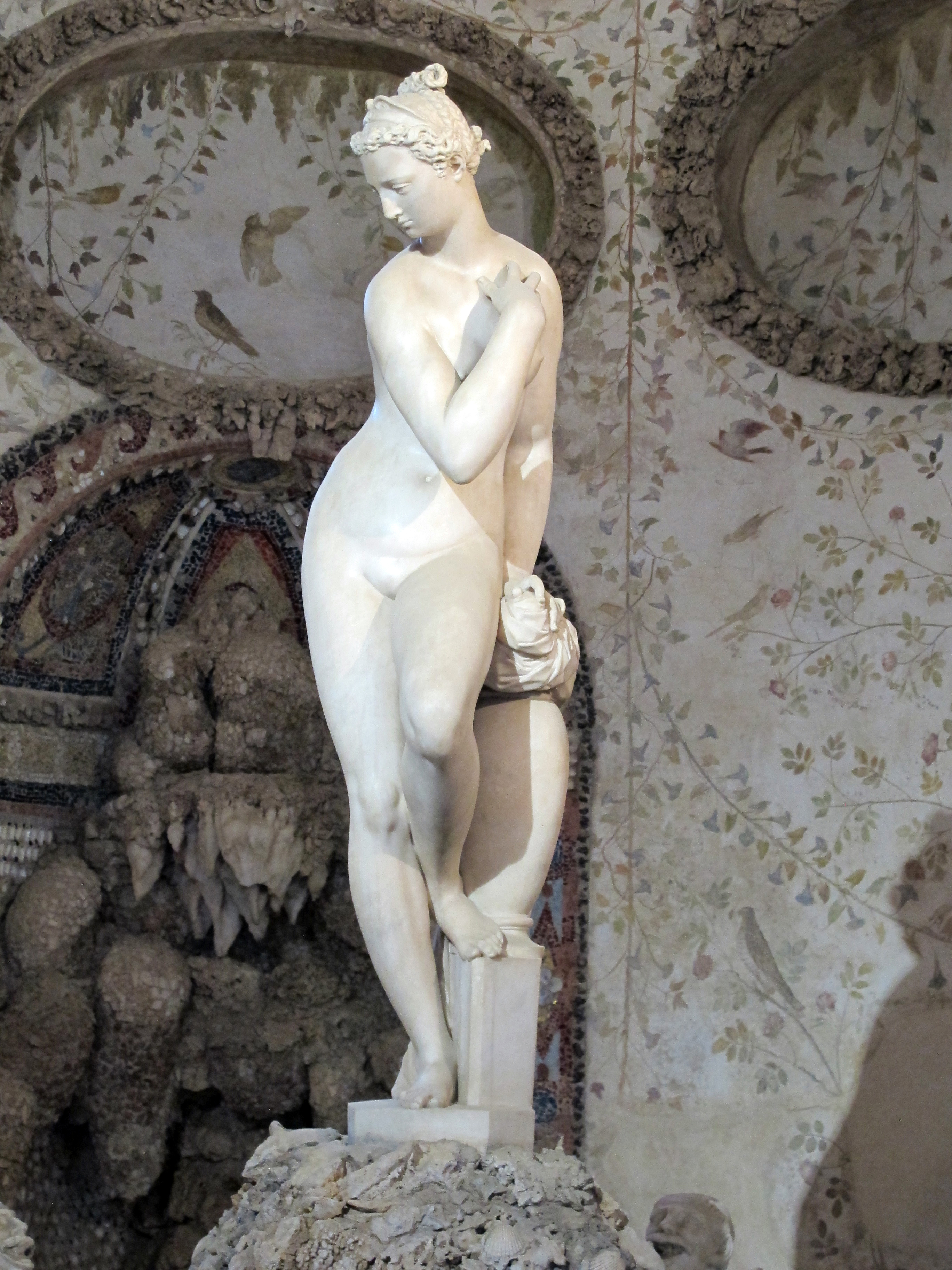 Grotta del Buontalenti, terza stanza, Venere e satiri del Giambologna